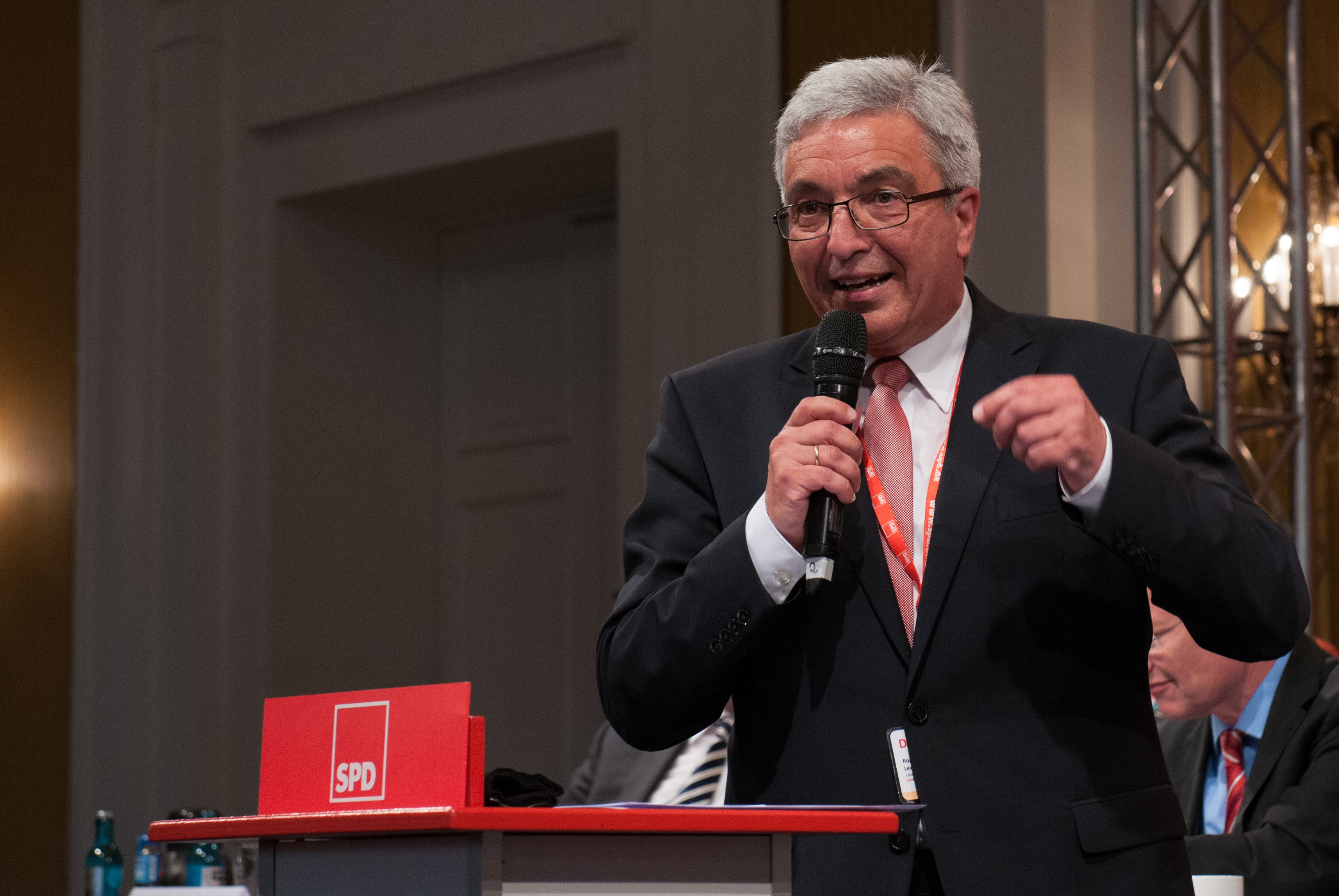 Sitzung des Landesparteirat der SPD Rheinland-Pfalz am 11. Mai 2016 zur Koalitionsvereinbarung